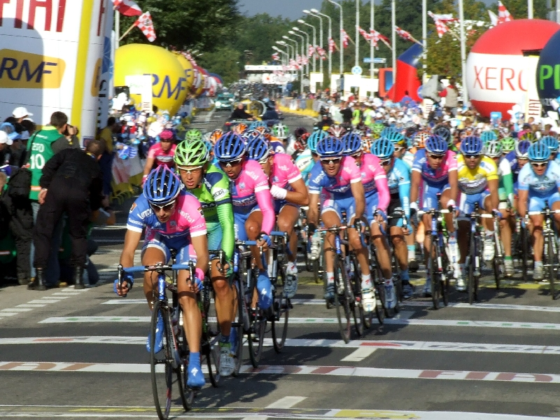 Piąty etap 64. Tour de Pologne: Września - Świdnica Licensing: This image or multimedia was created by Bartosz Senderek. The image or audio is licensed under CC-BY license. Attribution to me is required. Licencja: Ten obrazek lub plik multimedialny został stworzony przez Barotsza Senderka. Został on udostępniony na licencji CC-BY. Informacja o moim autorstwie jest wymagana. "I want to use the image/multimedia. How can I do that?" You can use this image/multimedia freely for any purpose, including commercial use, provided that you license it under the above license. My suggestion is to use text shown below: If you use the image I would appreciate it if you would let me know on my talk page, but this is not required as long as you follow the above license. "Chcę użyć tego pliku. Jak mogę to zrobić?" Możesz używać tej grafiki/multimediów darmowo w każdym celu, włączając użycie komercyjne, udostępniając go dalej na powyższej licencji. Jeśli zdecydujesz się na publikację zdjęcia mojego autorstwa obowiązkowo podpisz go w sposób podany w sekcji "Licensing text". Jeżeli użyłeś mojego pliku możesz powiadomić mnie o tym na mojej stronie dyskusji, lecz nie jest to wymagane, dopóki trzymasz się powyższej licencji.